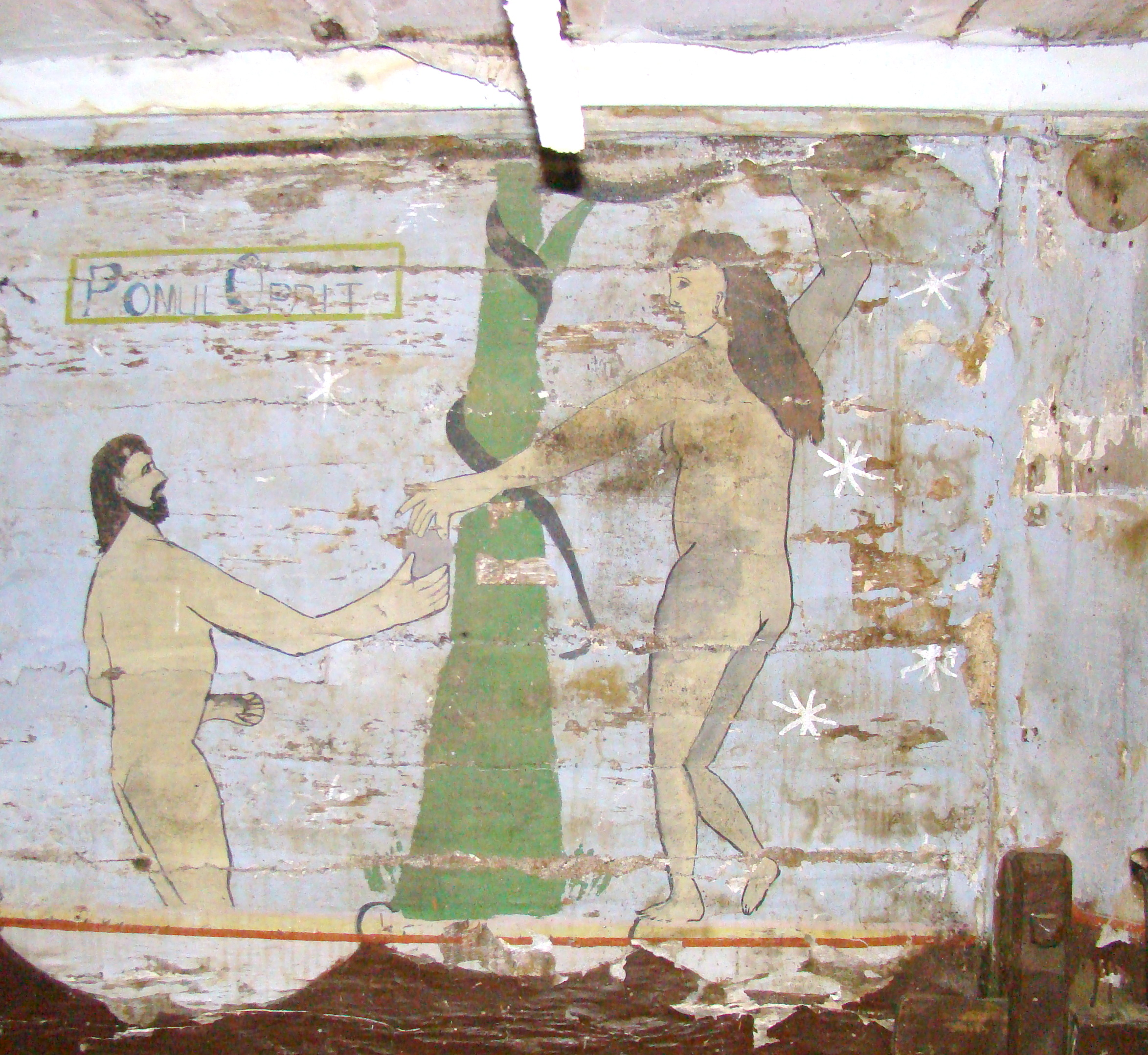 Pomul oprit. Biserica de lemn din Toplița, comuna Letca, judeţul Sălaj